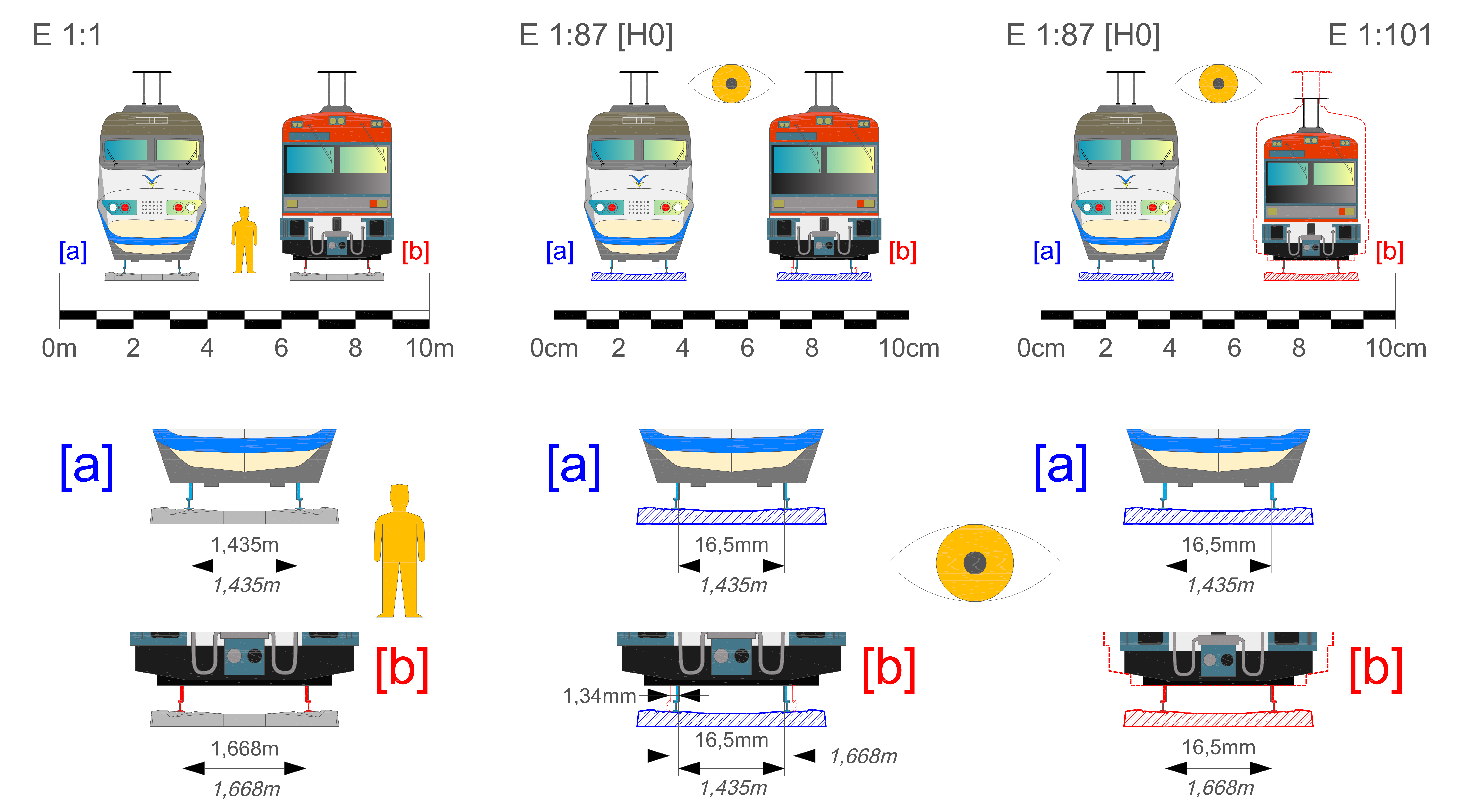 Adaptación de material rodante de ancho ibérico (1688 mm) a la vía H0 , diseñada para trenes de ancho estándar (1435 mm) (vía de 16,5 mm y escala 1:87)